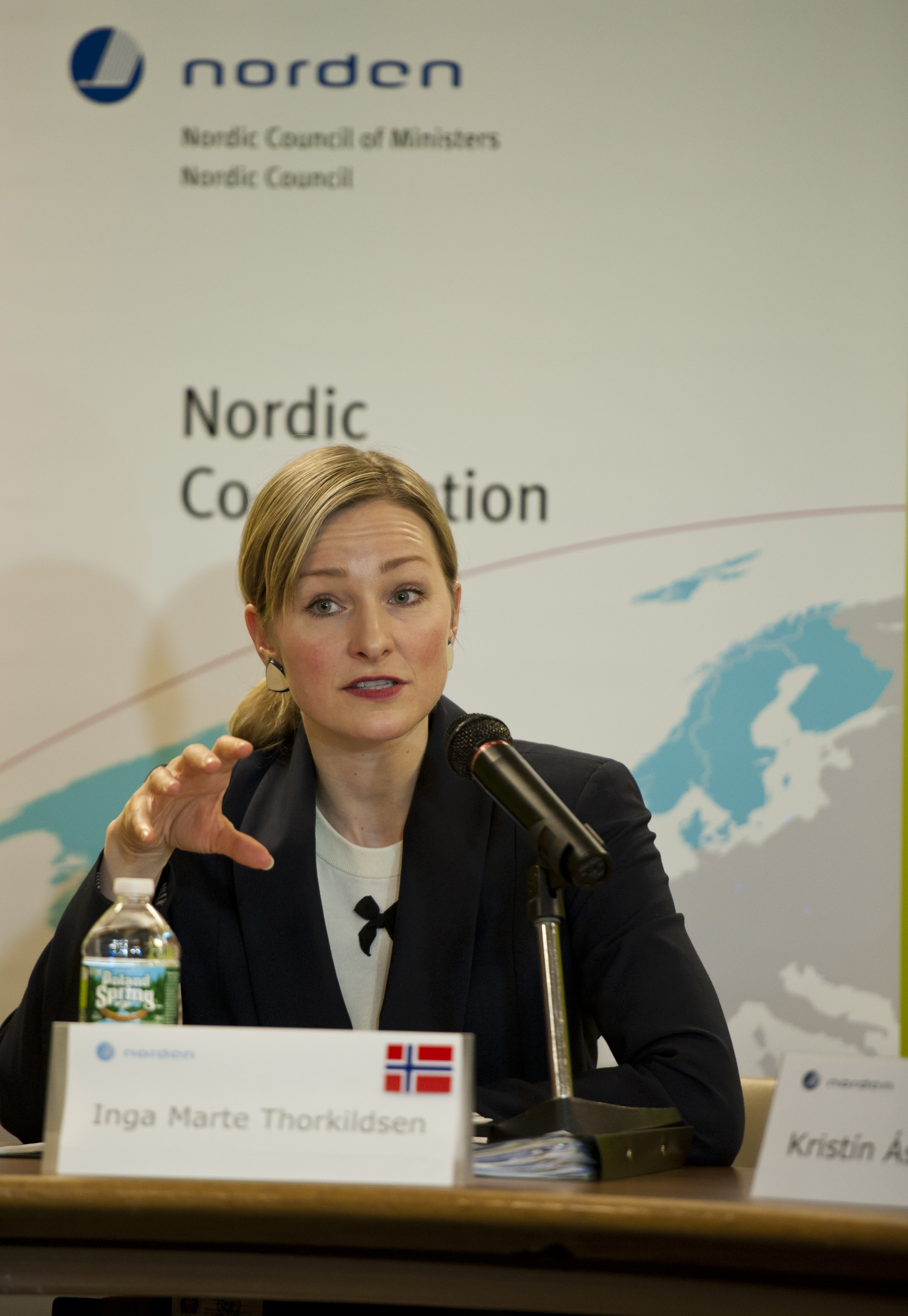 Norges ligestillingsminister Inga Marte Thorkildsen under FN's Kvindekommissions samling (CSW) 2013